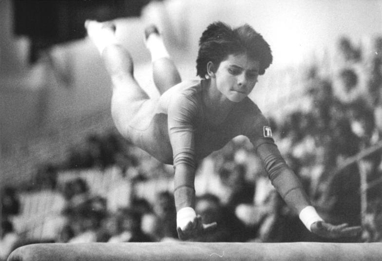 Katharina Rensch ADN-ZB Mittelstädt 23.5.80 Berlin: DDR-Turnmeisterschaften -Mit einer imponierenden Serie avancierte die 15jährige Katharina Rensch (TSC Berlin) am 22.5.80 zur besten Kürturnerin. Für ihren Horida-Sprung am Pferd wurde sie mit 9,80 Punkten honoriert. Insgesamt belegt sie nach der Titelverteidigerin Regina Grabolle den zweiten Platz.